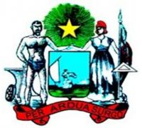 Brasão do Município de Abaré, Bahia